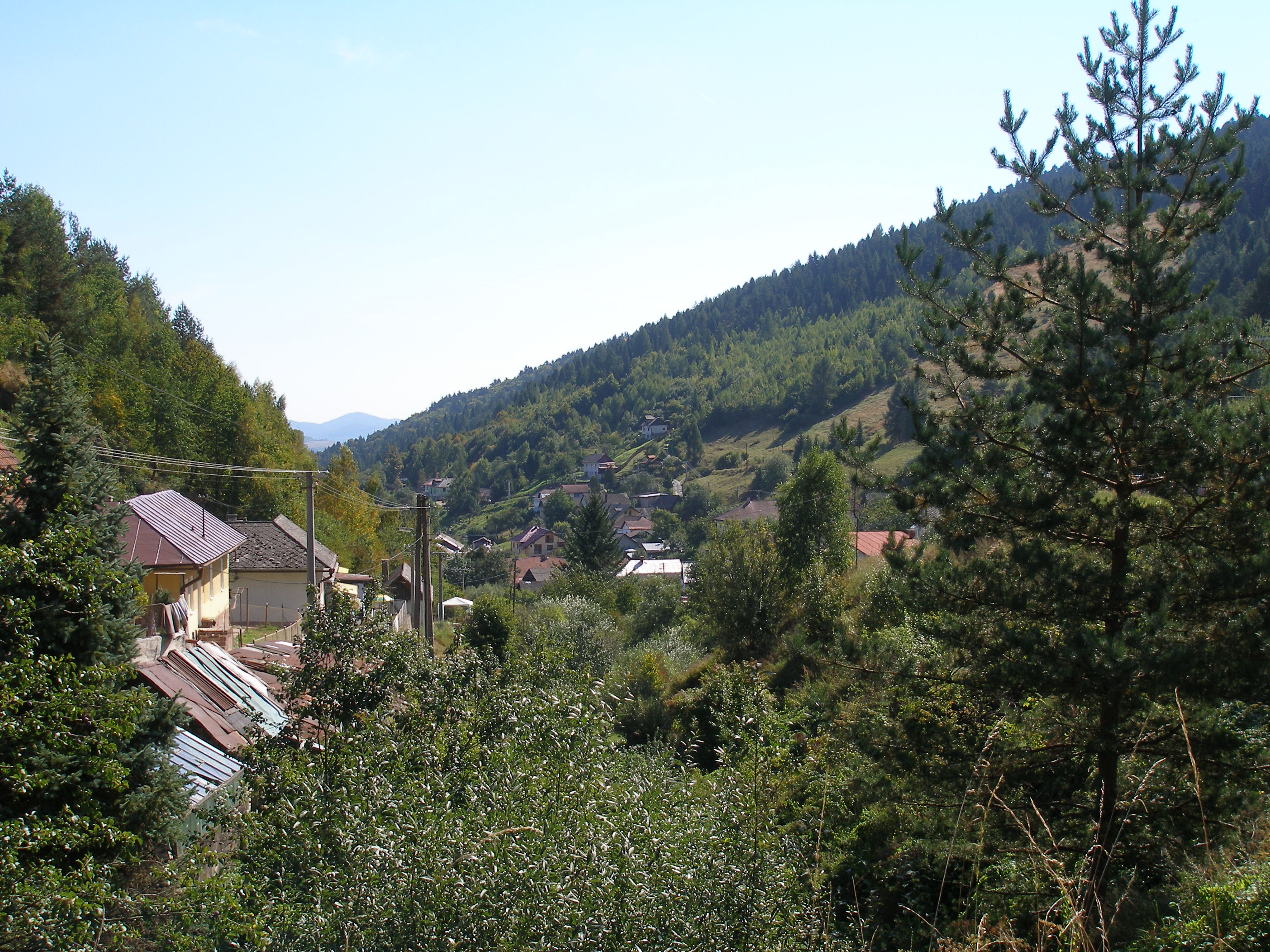 Spišská obec Žakarovce.Okres Gelnica.